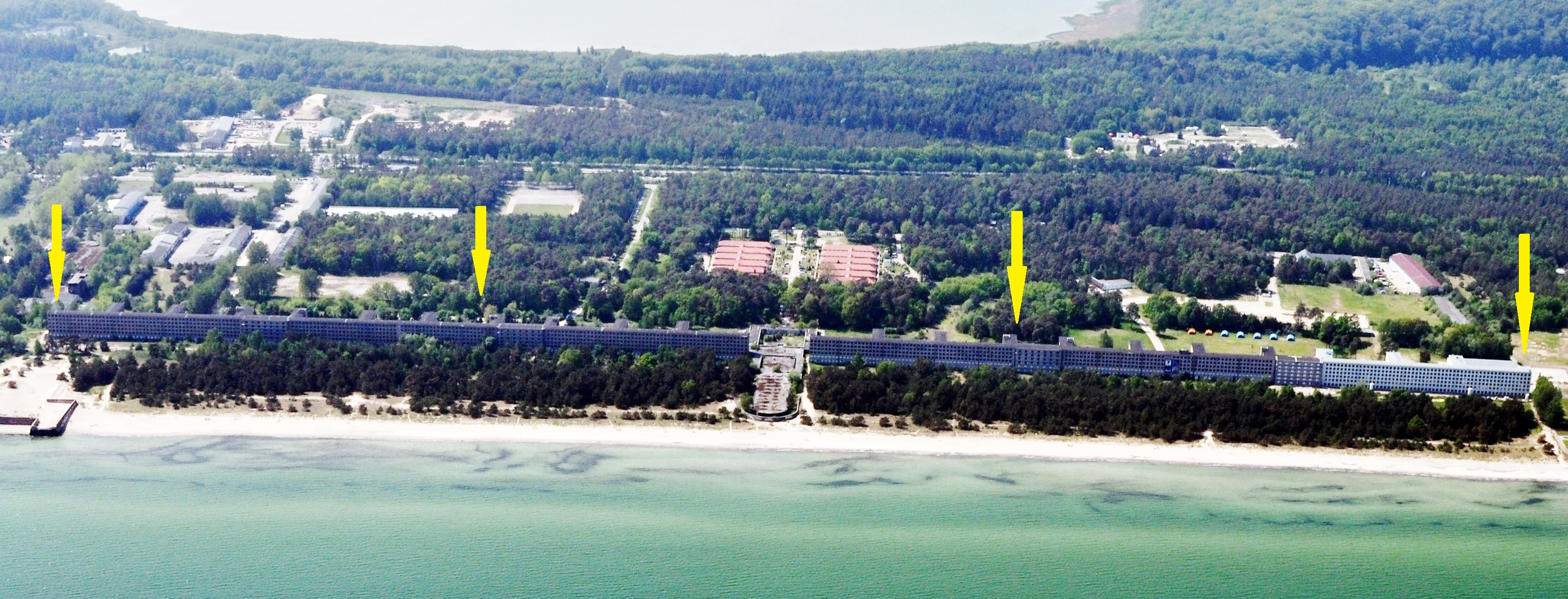 Die Bilder wurden von mir während eines einstündigen Rundflugs ab Flugplatz Güttin am 21. Mai 2011 aufgenommen. Die Bildbeschreibung steht im Dateinamen. Aufgenommen mit einer Nikon D5000 durch das Seitenfenster des Flugzeugs.